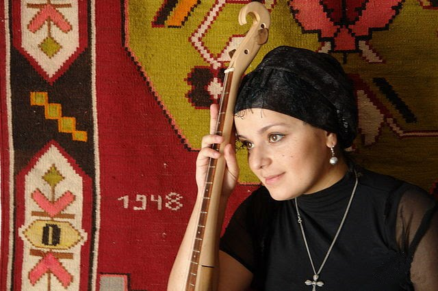 თეონა ქუმსიაშვილი